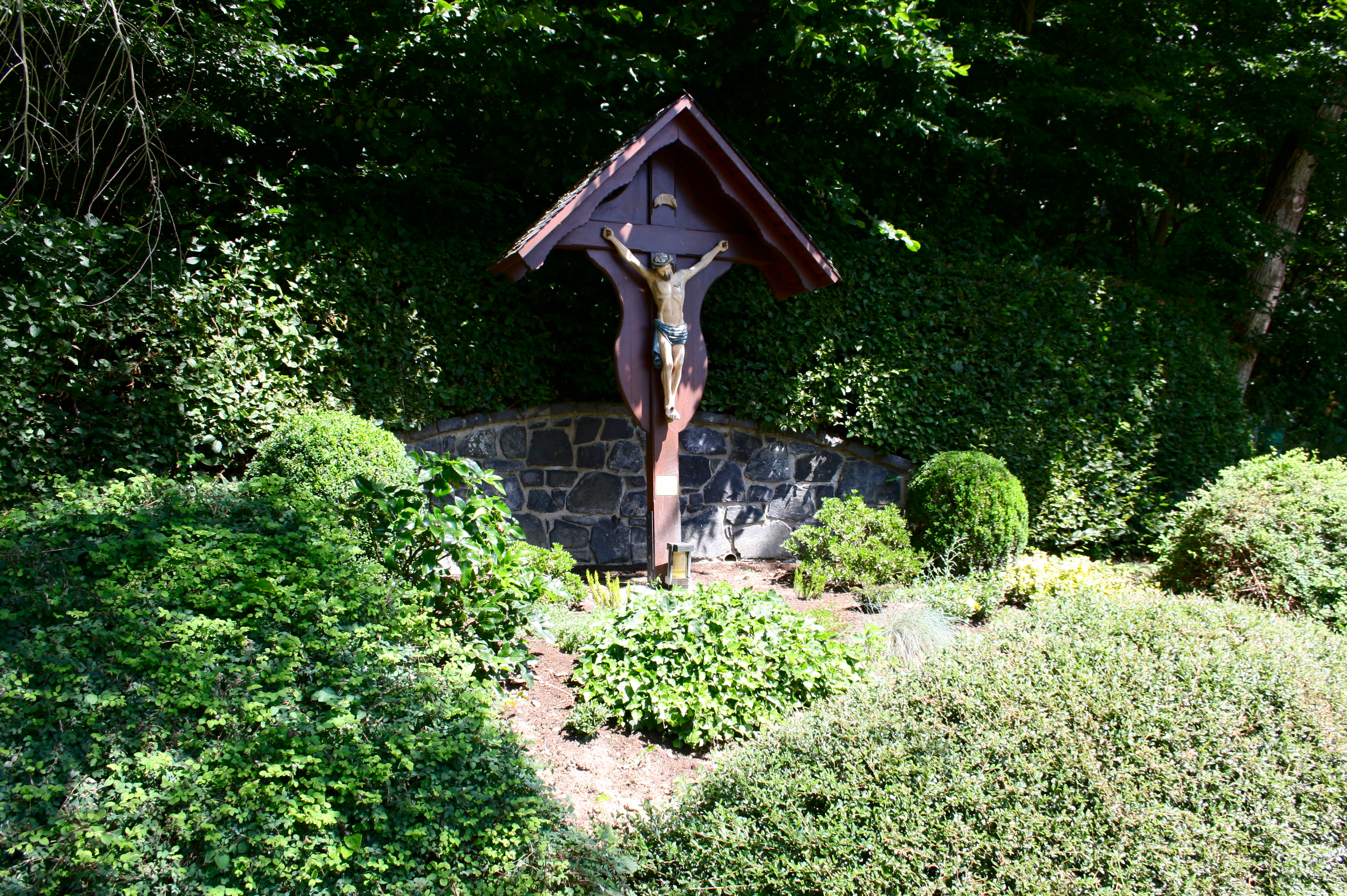 Wegekreuz (2003) Sespenroth, Heilberscheid, Westerwald, Rheinland-Pfalz, Deutschland